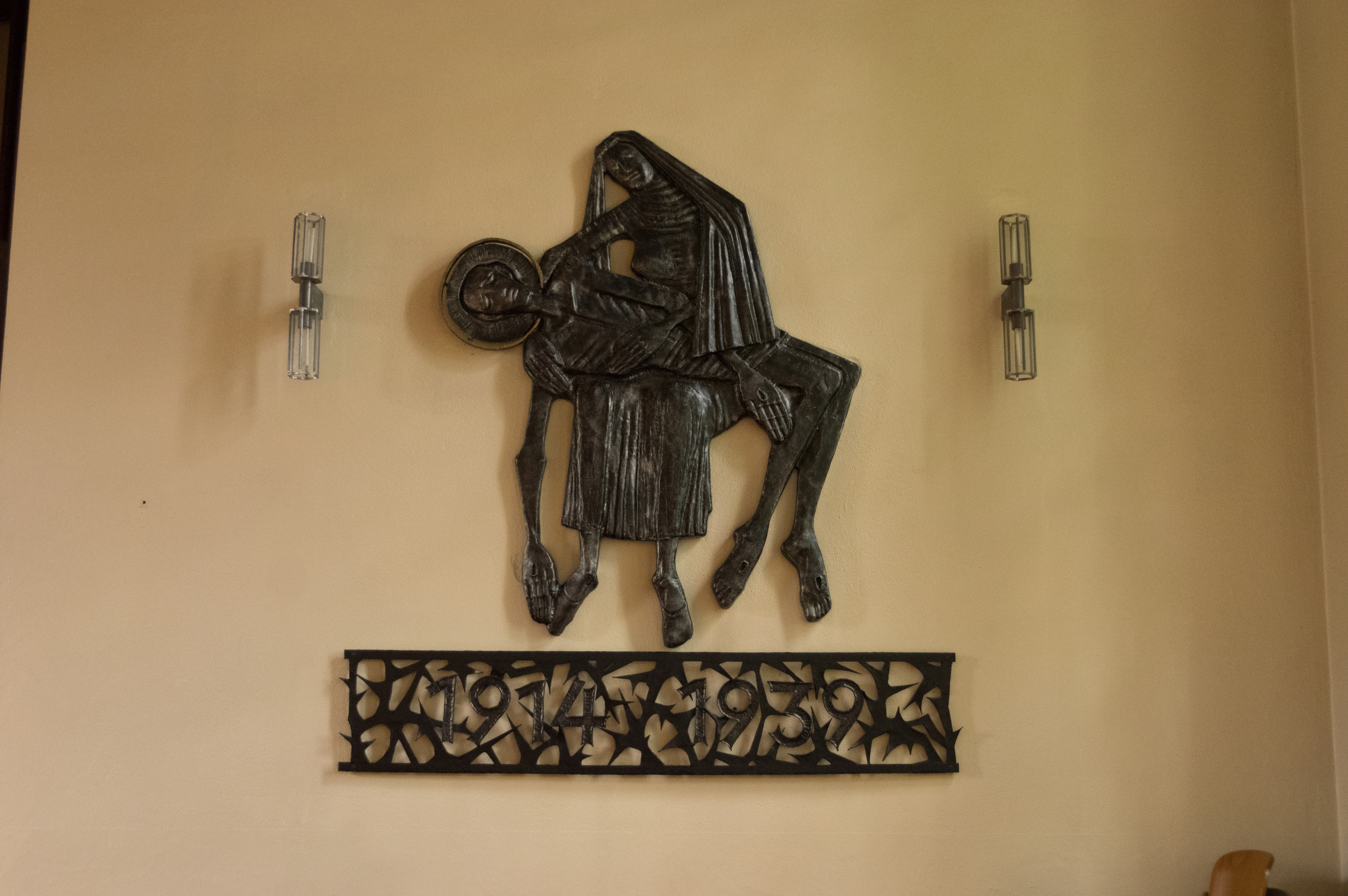 Berlin-Rudow. Die Dorfkirche steht unter Denkmalschutz. Die Pieta.